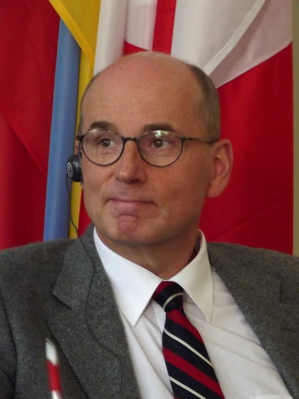 Jan Rokita, polityk. Zdjęcie zrobione podczas XXIII Forum Ekonomicznego w Krynicy-Zdroju.